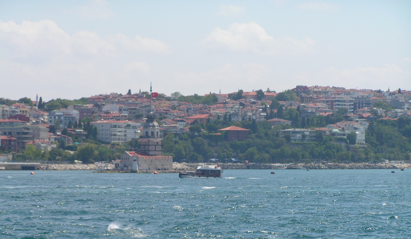 Une vue sur Uskudar, avec la Tour de Léandre, Istanbul